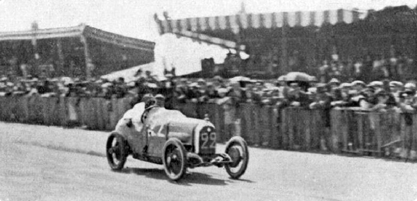 René Thomas vainqueur de la Coupe des Voiturettes 1921, sur Talbot-Darracq 56 (au Mans) - Gérard de Courcelles sur Hinstin au Grand Prix de l'U.M.F. Cyclecars 1921, p.1100